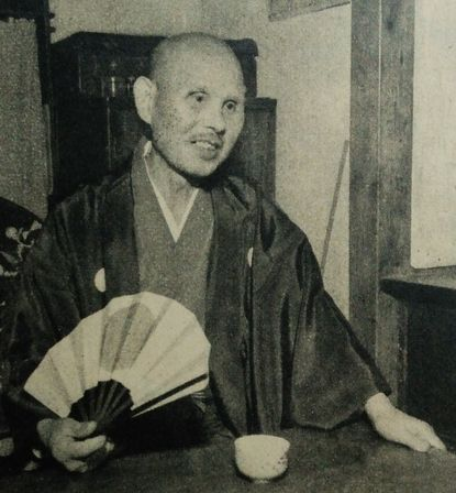 熊沢寛道